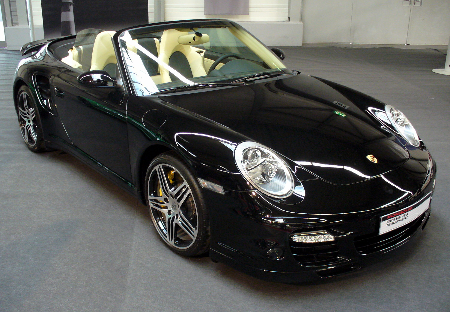 Porsche 997 Turbo Cabrio